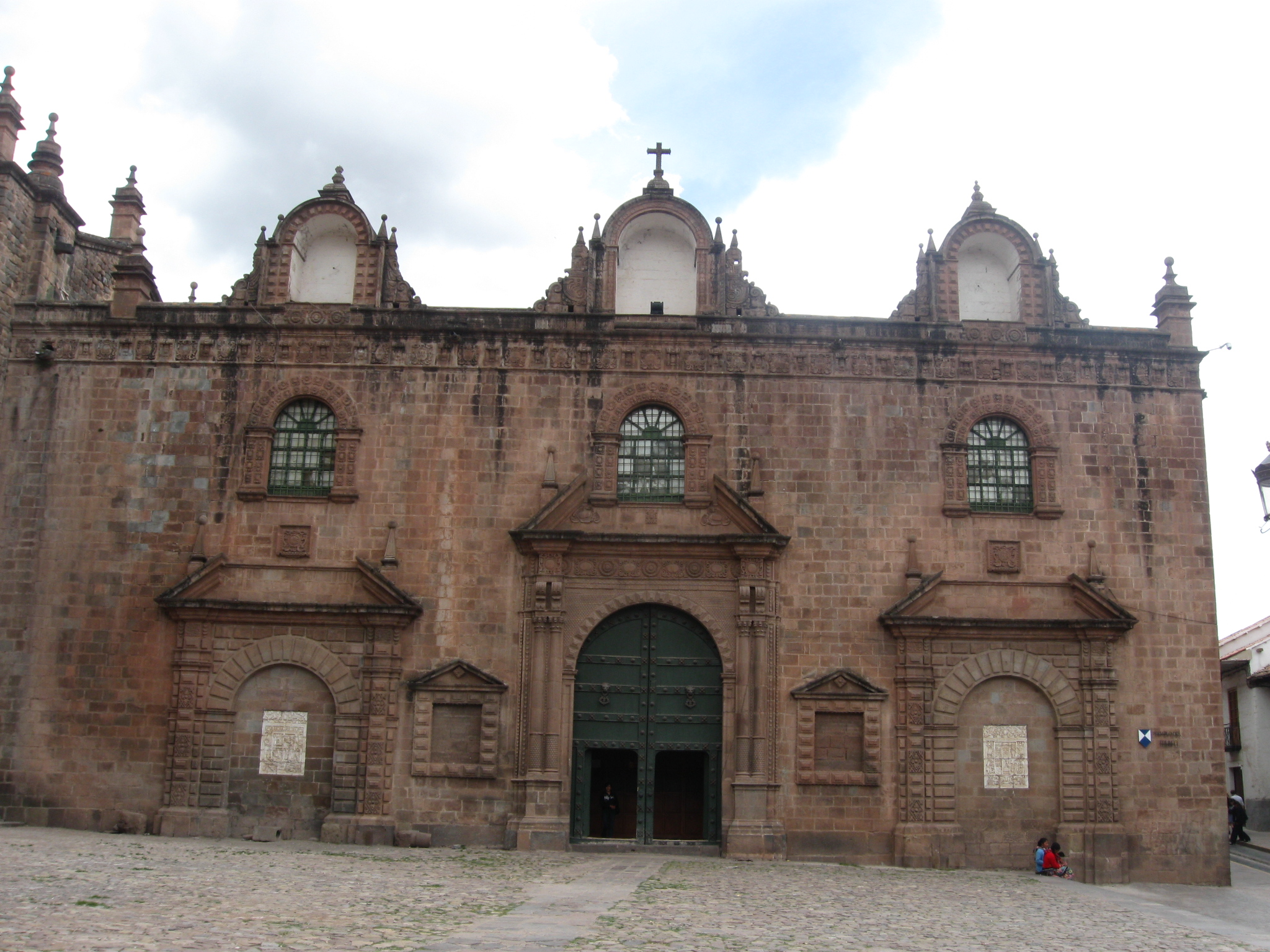 Ubicado hacia la izquierda de la Catedral